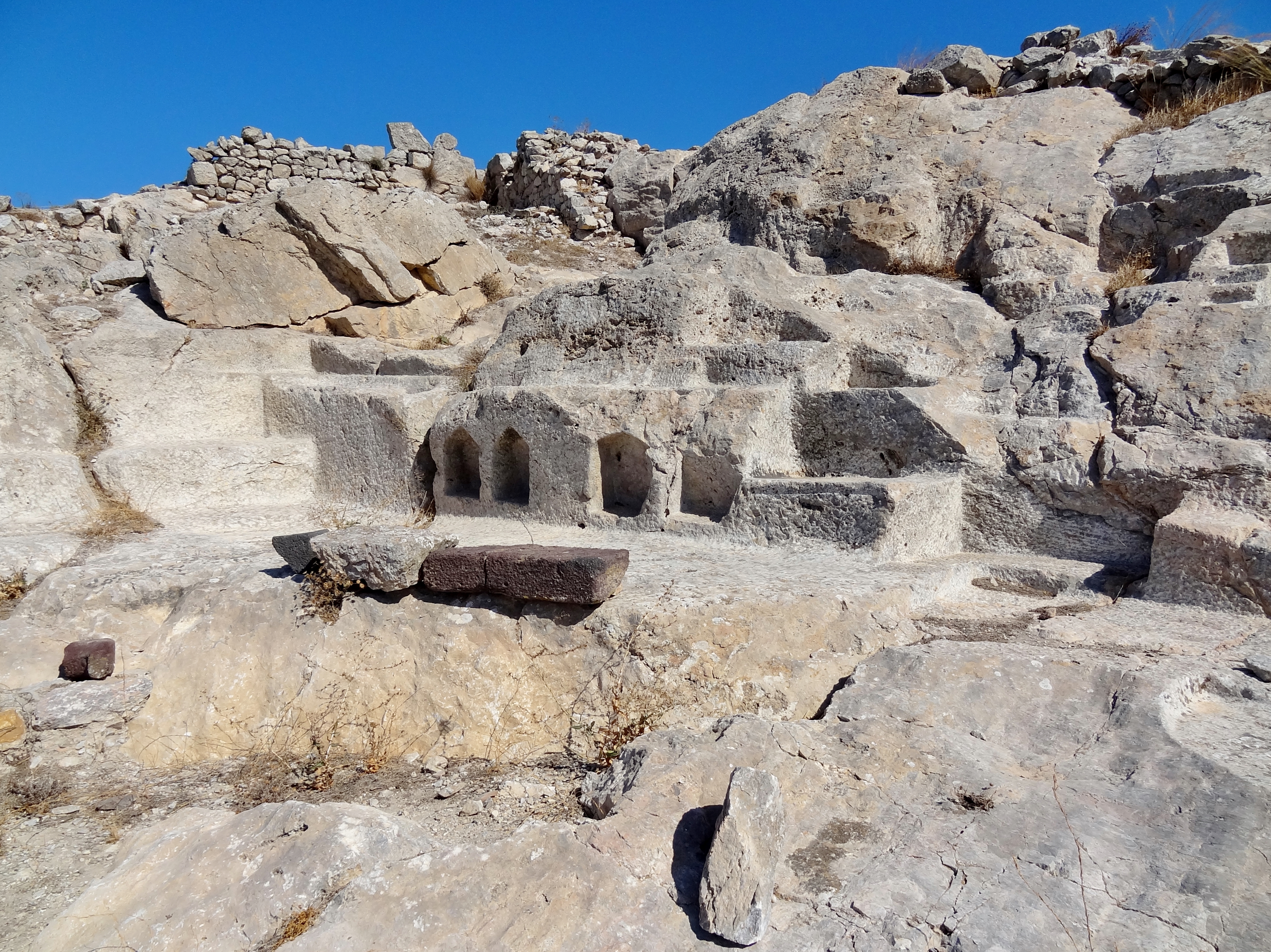 Iero Aigyption Theon (‚Heiligtum der Ägypischen Götter‘) in Alt-Thera, Santorin, Kykladen, Griechenland